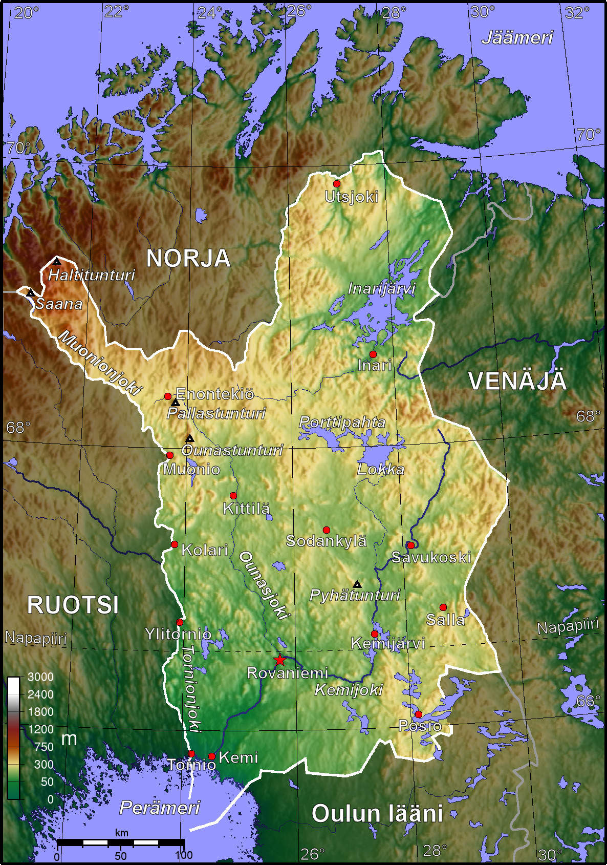 Lapin läänin topografinen kartta (suomenkielinen versio)